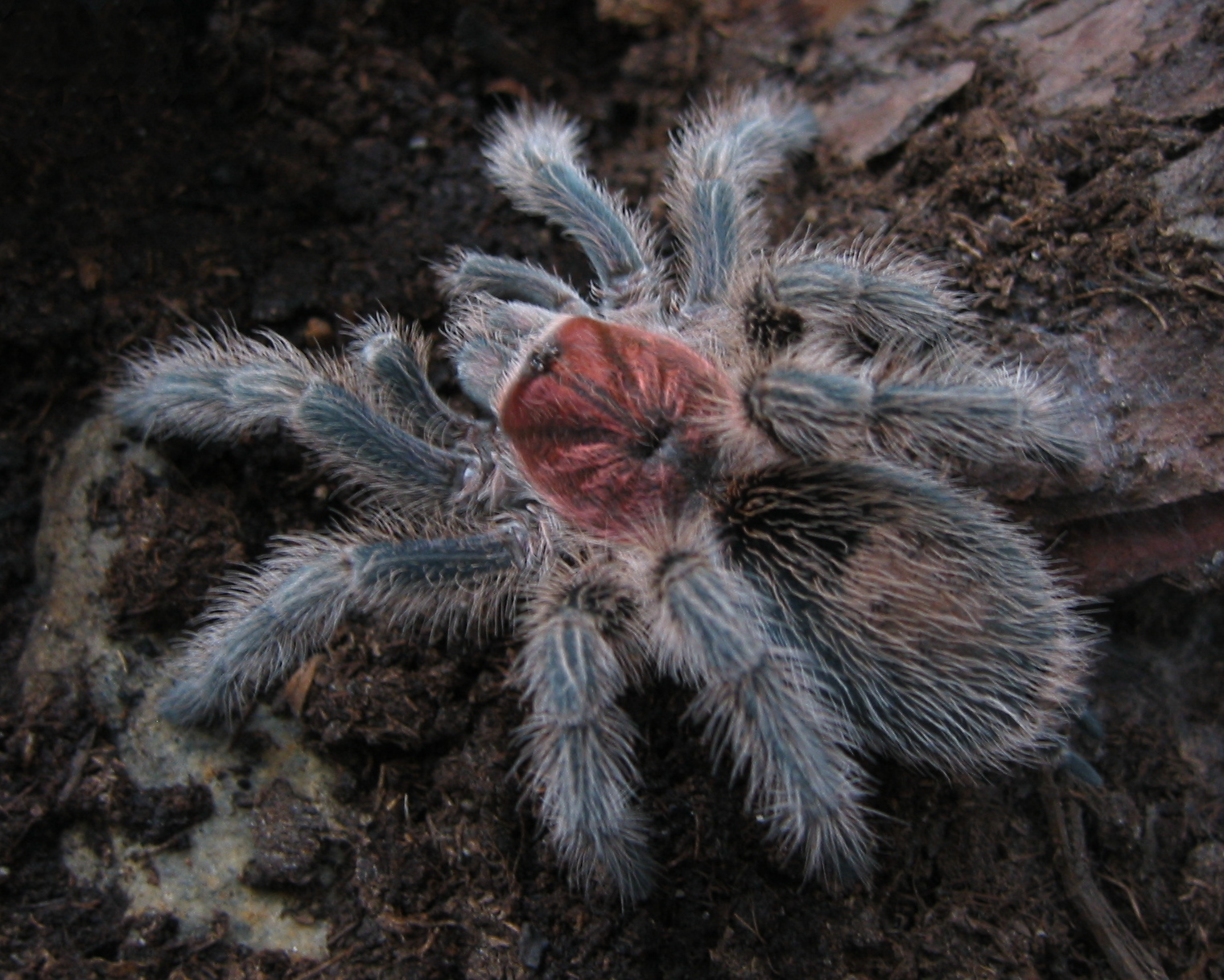 Esemplare sub adulto di Grammostola rosea (Chilean rose). Circa 5 anni